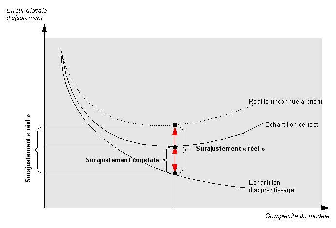 Surajustement d'un modèle de data mining arbre de décisions arbitrage performance complexité